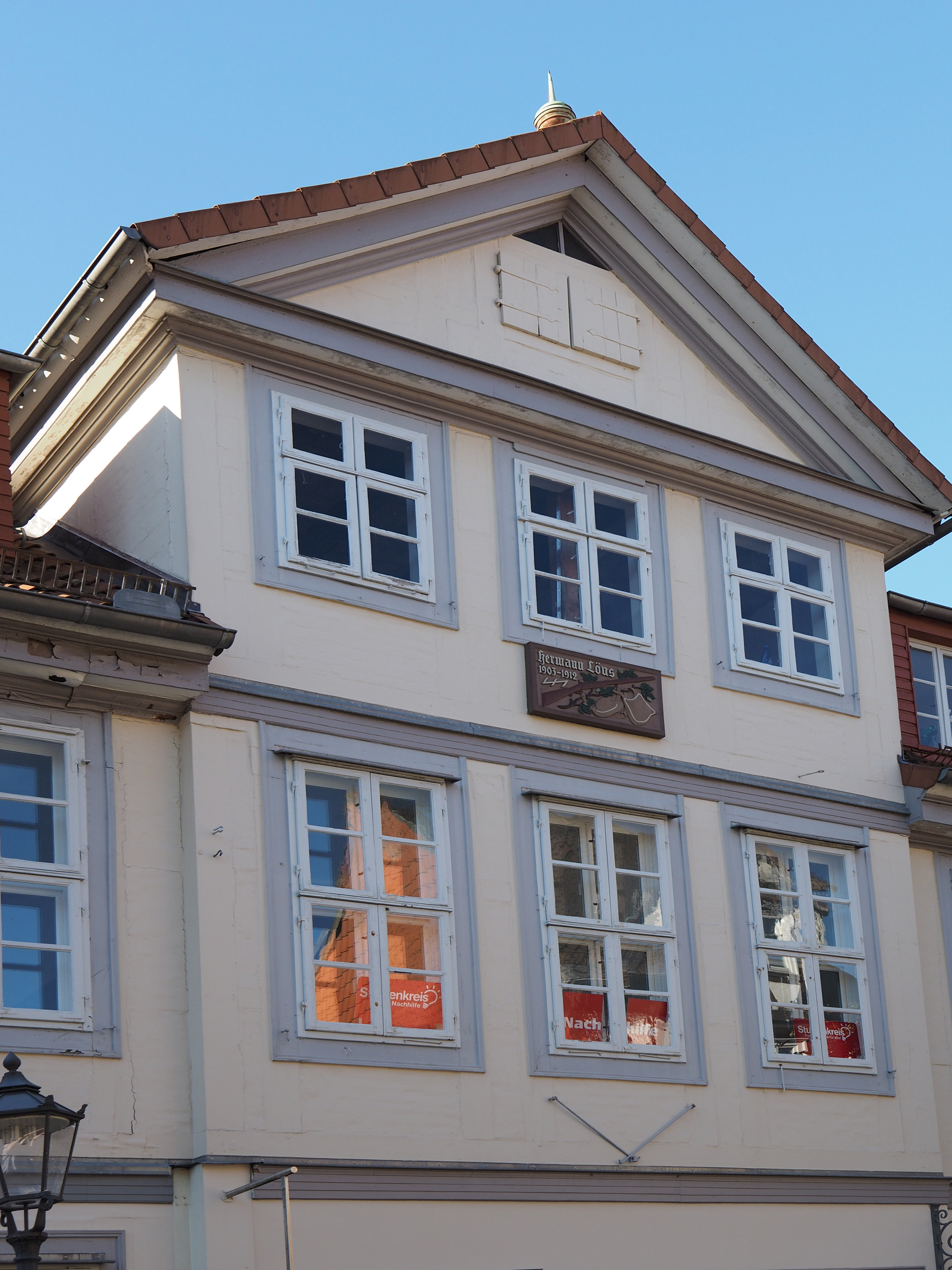 Celle, Mauernstraße 47 - Hier lebte Hermann Löns zeitweise zusammen mit Hanna Fueß von 1903 bis 1912.